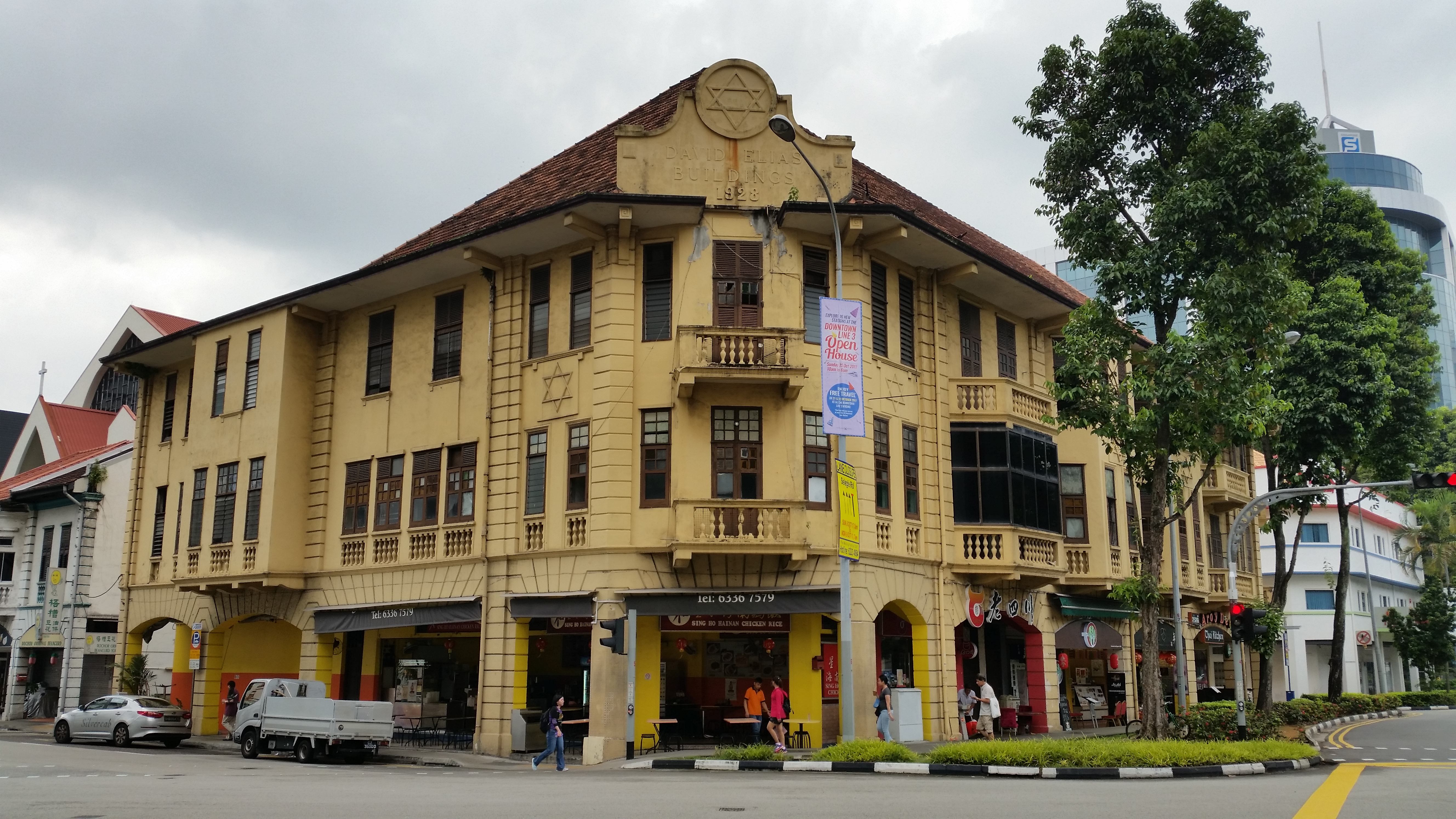 David Elias Building, Middle Road 260-270 on Short St. near Selegie Road.